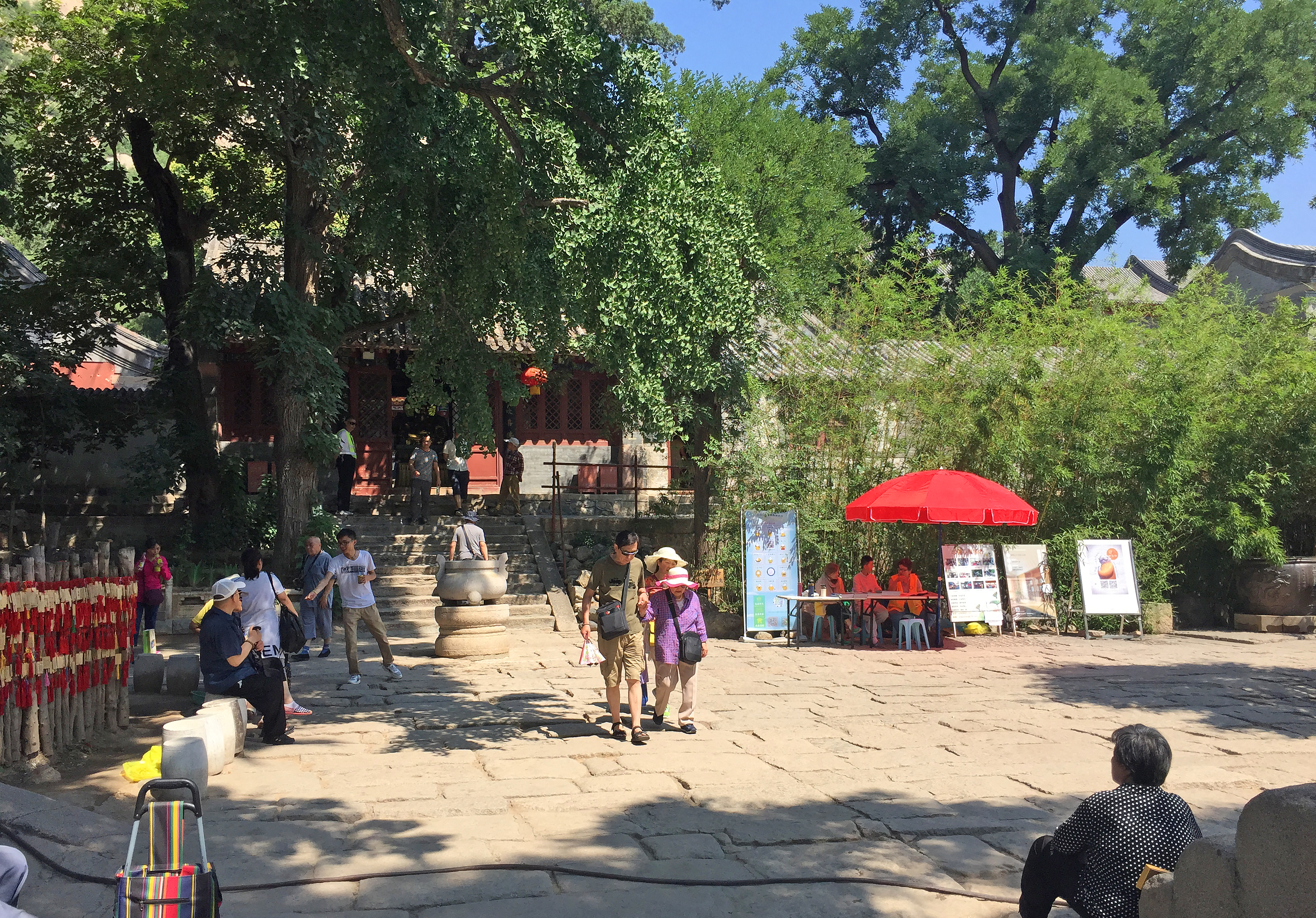 龙泉寺中院的天王殿